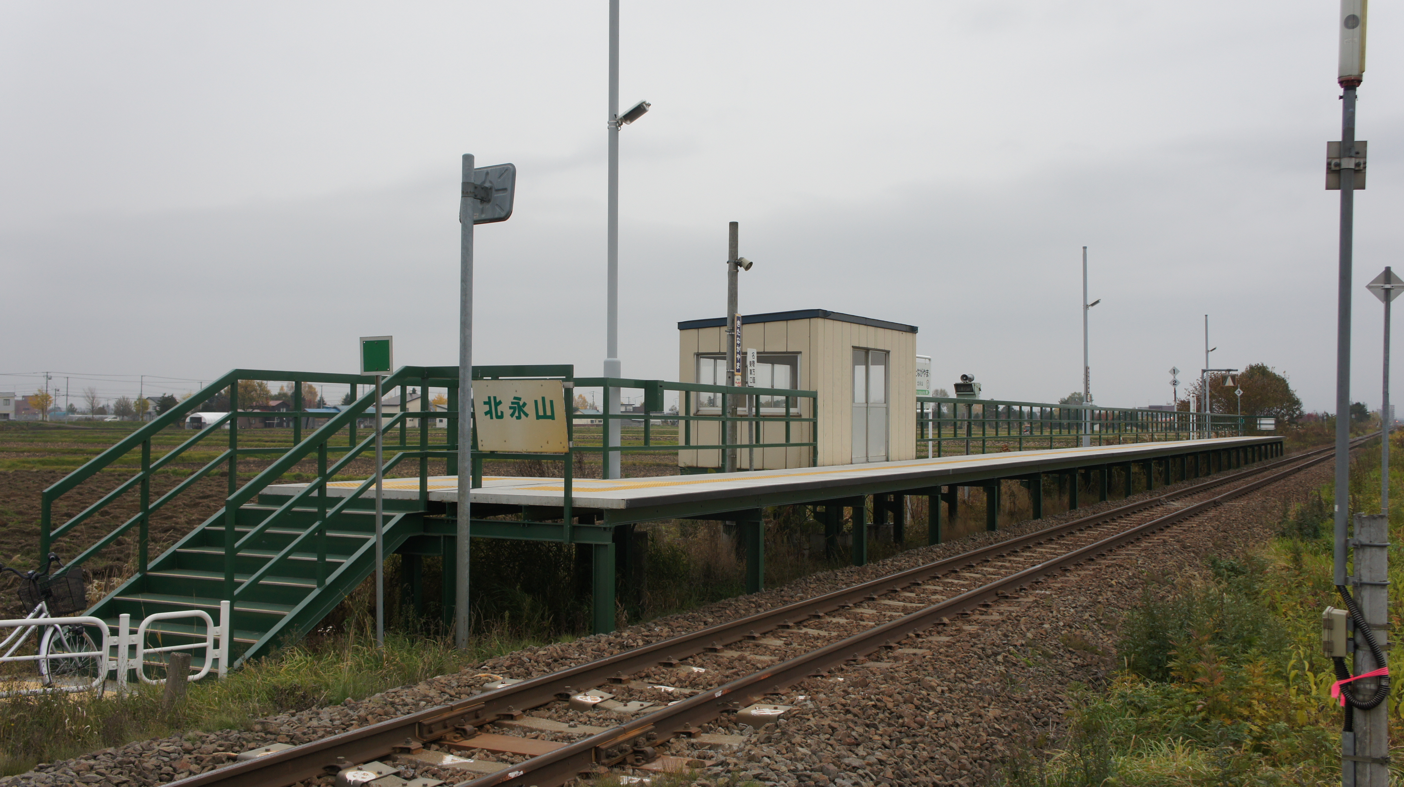 JR宗谷本線・北永山駅全景 Sony NEX-3